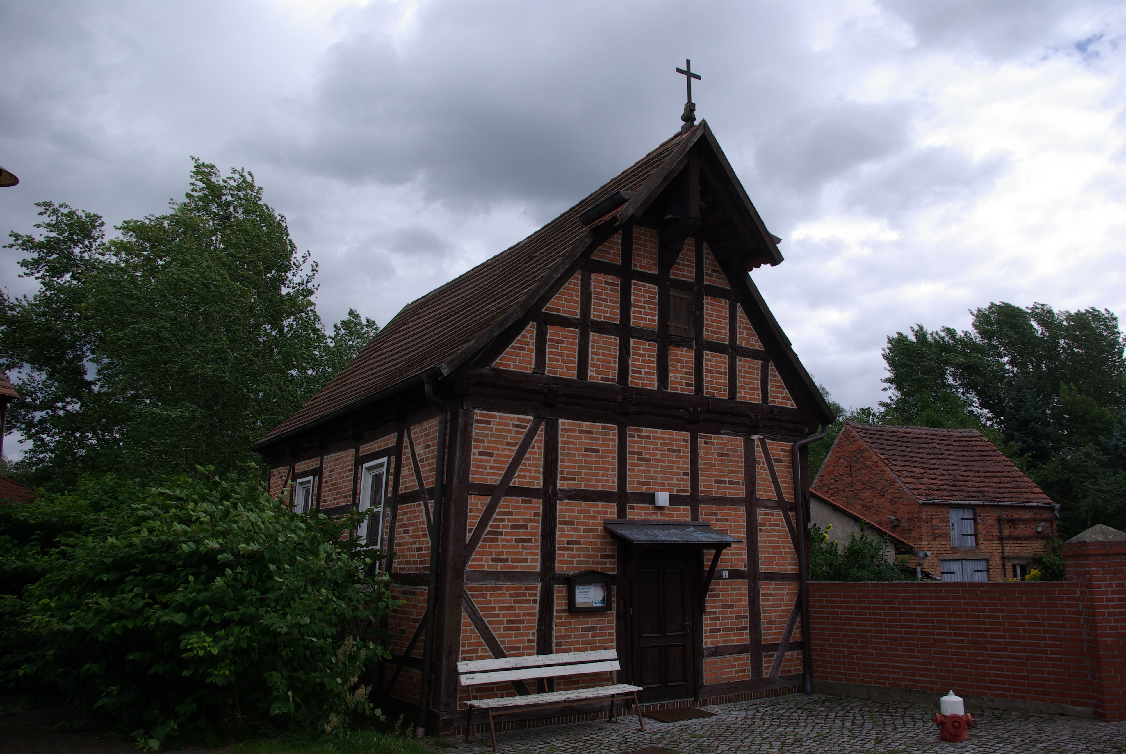 Rühstädt in Brandenburg. Die Kapelle im Ortsteil Gnevsdorf steht unter Denkmalschutz.